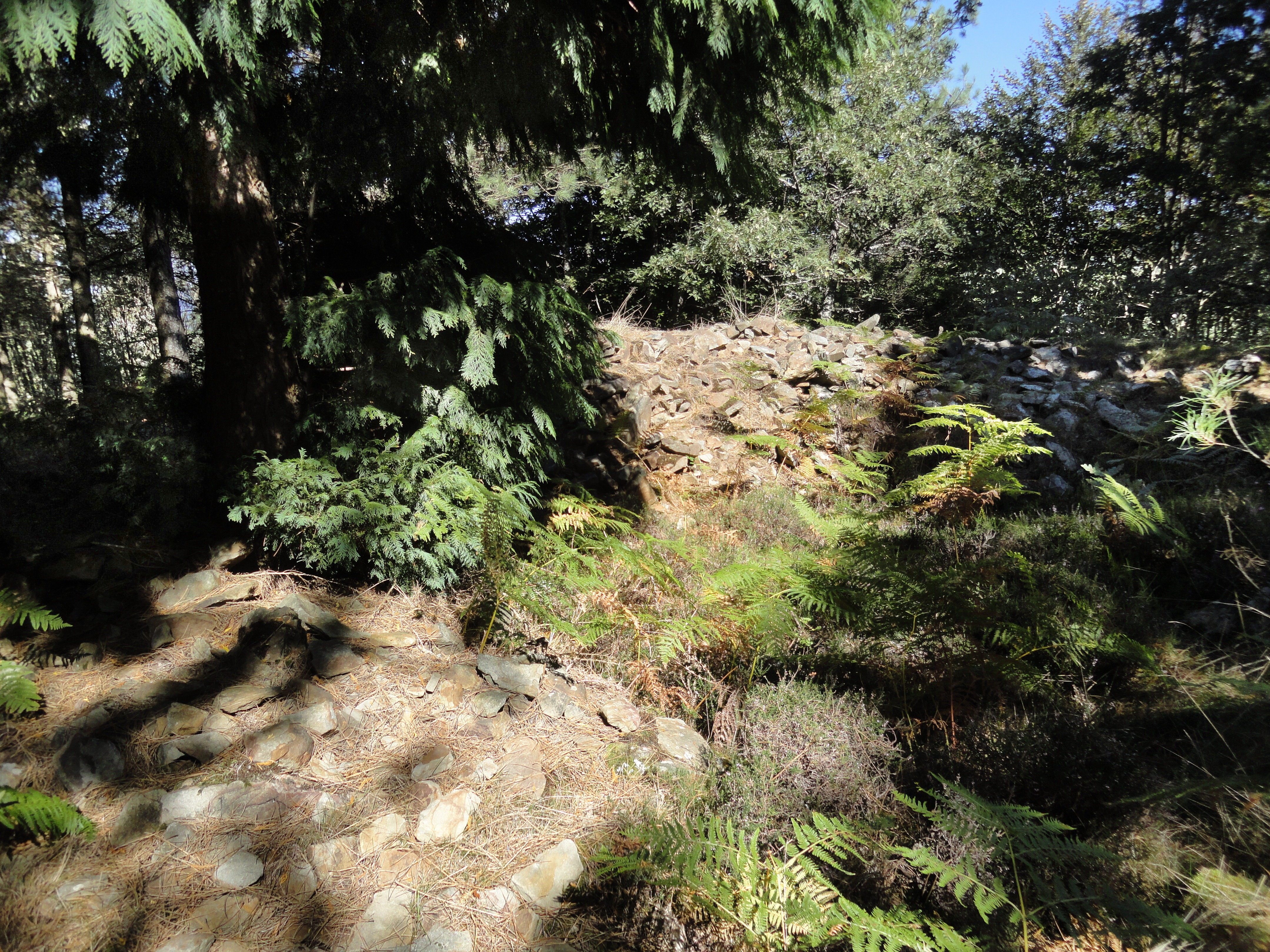 Arrolamendi II tumulua